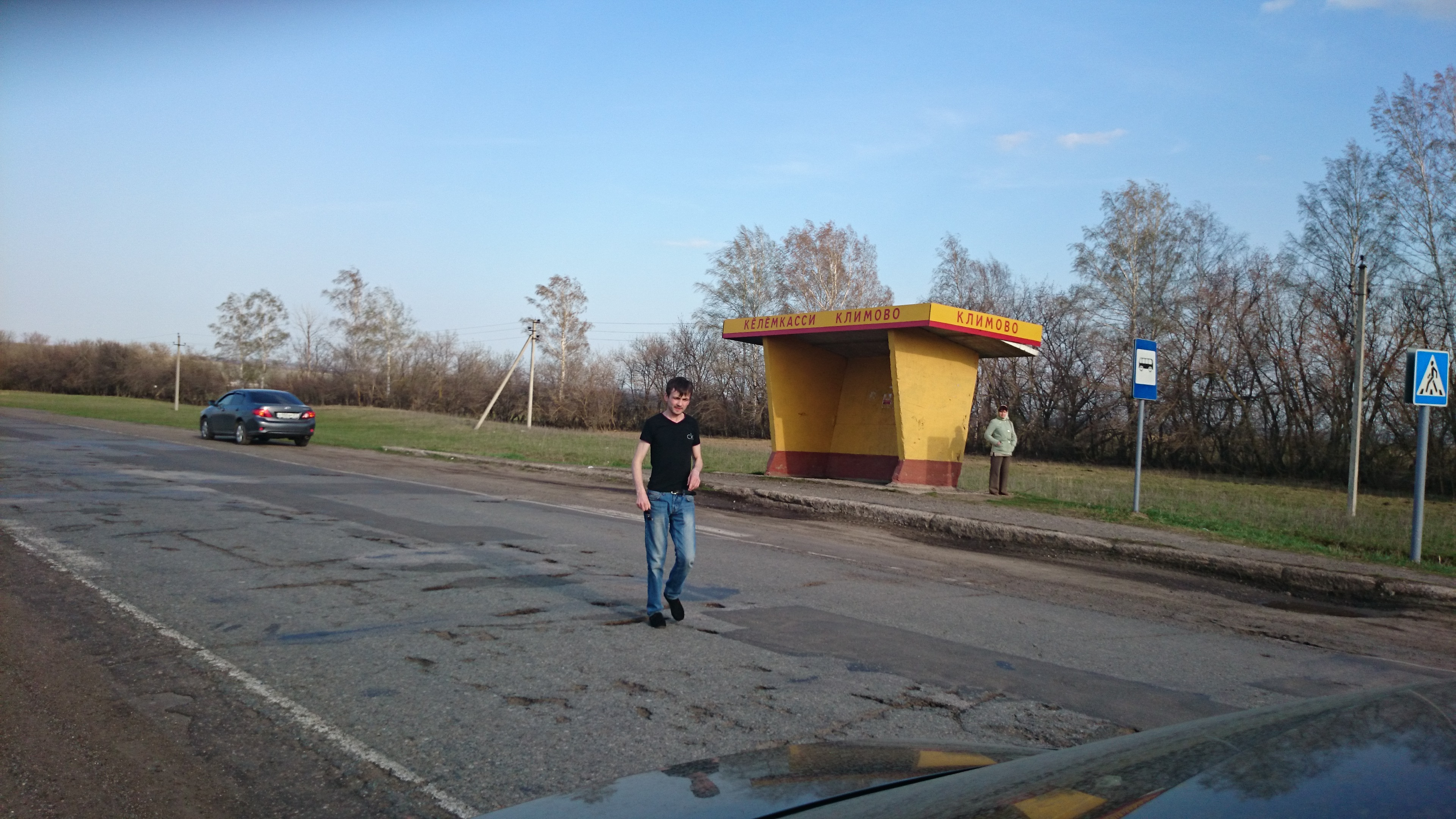 Климово 2 мая 2014